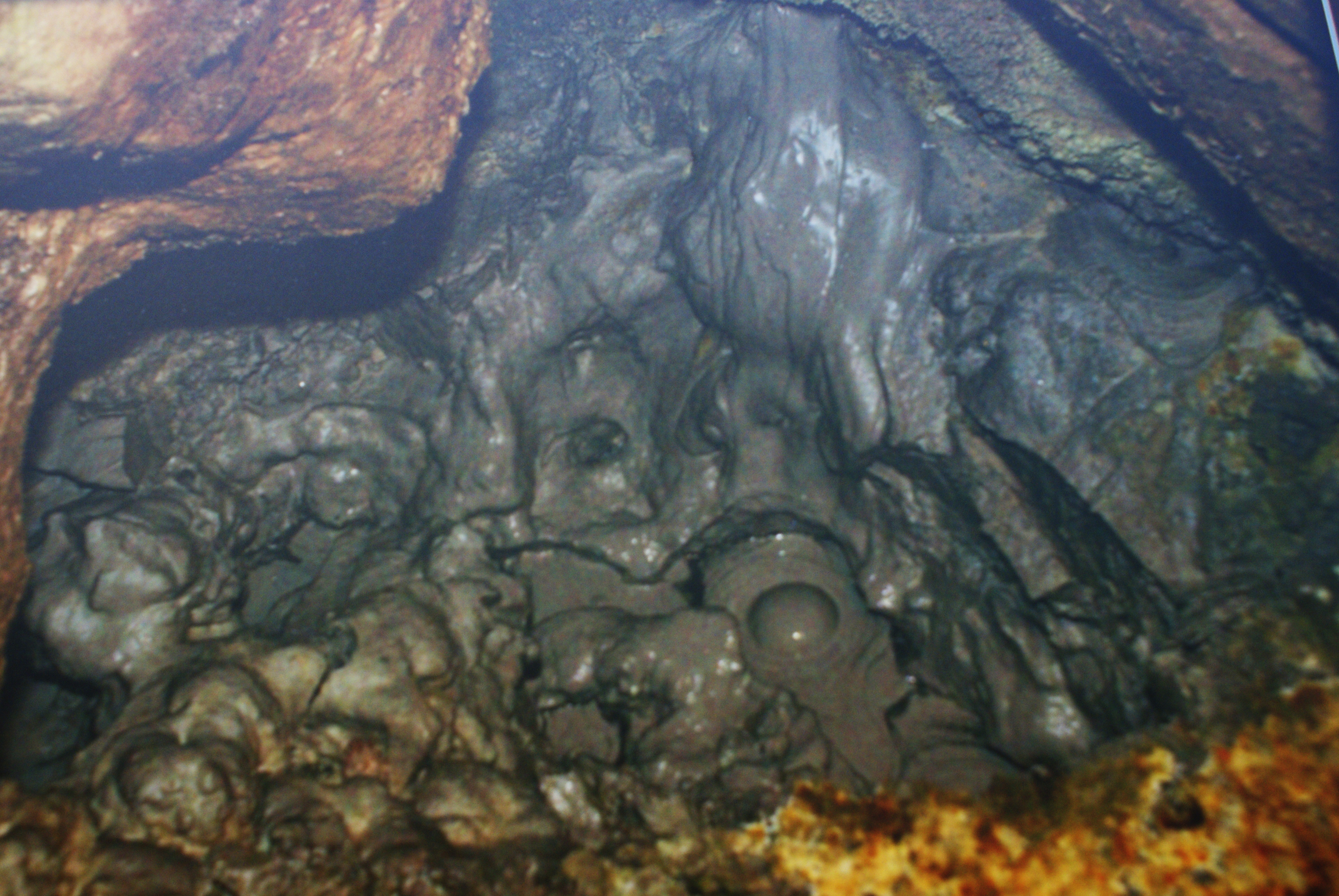 Furna do Enxofre, Lama fervente, Santa Cruz da Graciosa, ilha Graciosa, Açores, Portugal